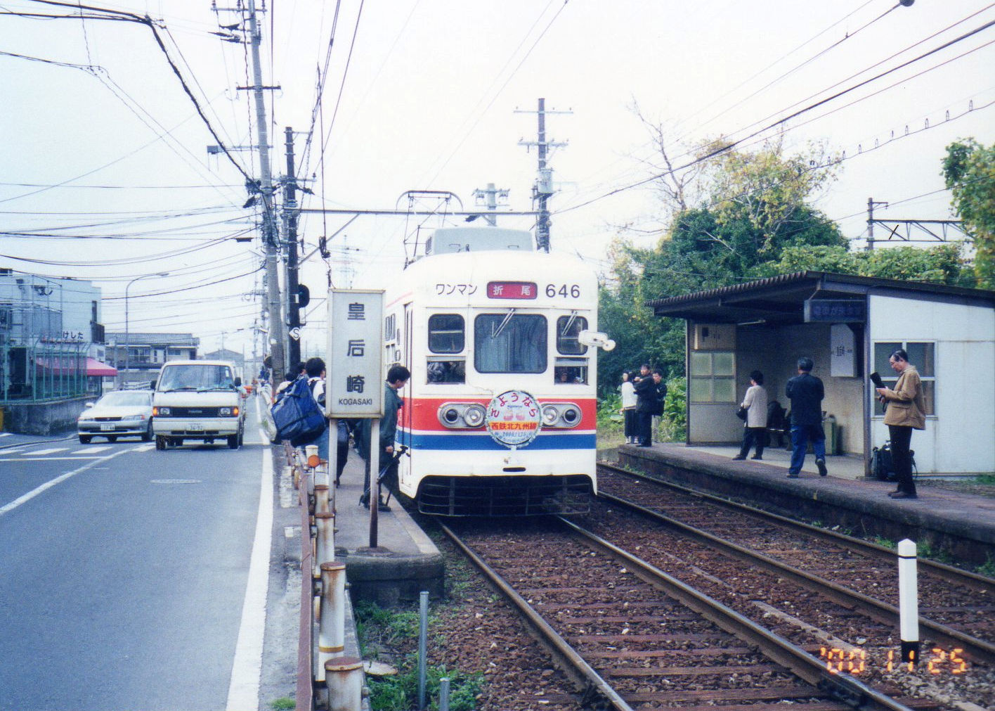 西日本鉄道北九州線皇后崎停留場に停車中の600形電車